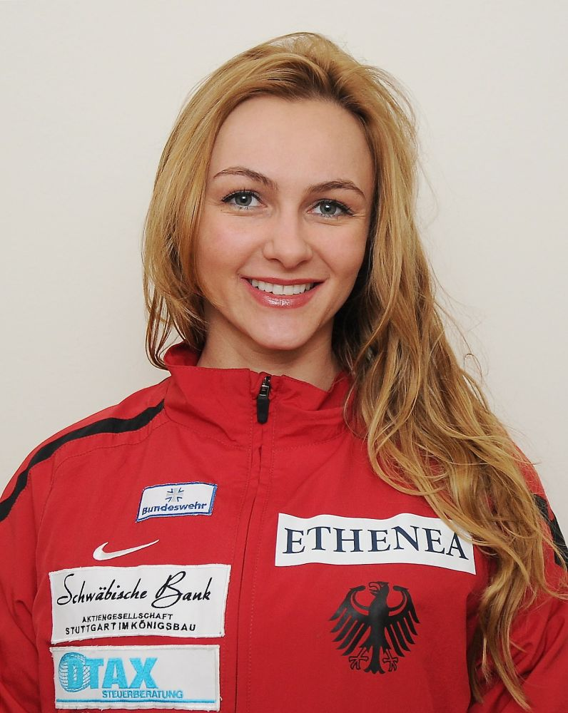 Porträt Monika Sozanska 2014